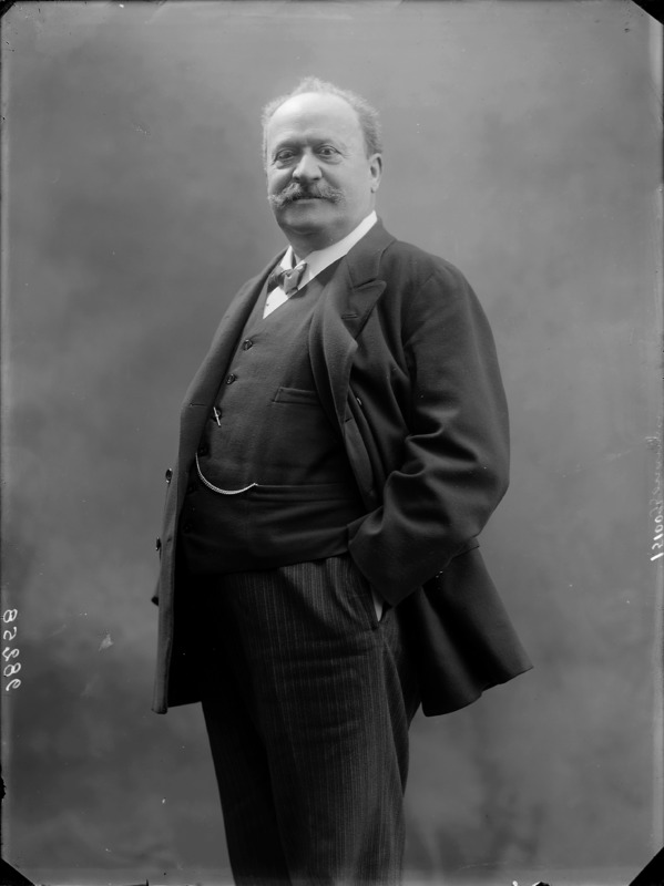 Giuseppe Buonamici fotografato da Mario Nunes Vais